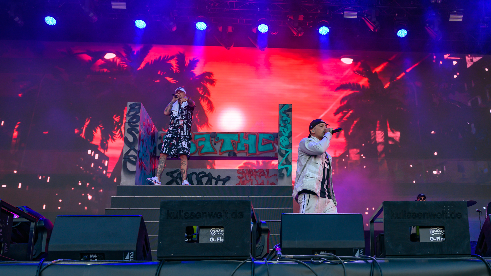 ARGO-Konzerte,Beck's Park Stage,Bonez MC & RAF Camora,Konzert,Livekonzert,Livemusik,Musik,RiP,Rock im Park 2019